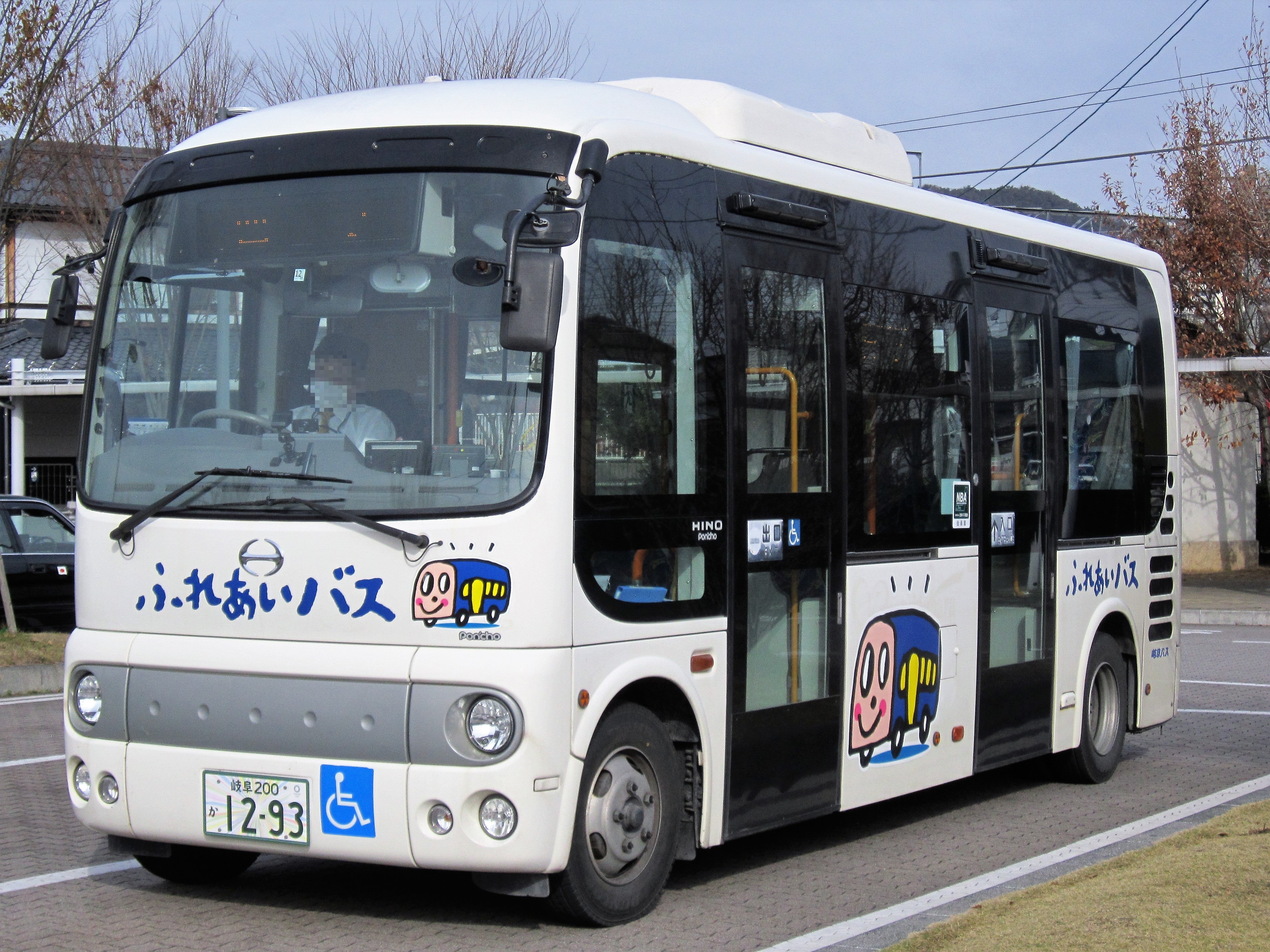 新鵜沼駅前に停車中の各務原市ふれあいバス Canon PowerShot A2200